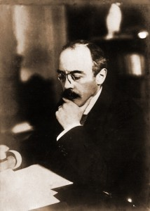 Hình Toàn quyền Đông Dương Albert Sarraut trong Nam Phong Tạp Chí, quyển 1, trang 4.